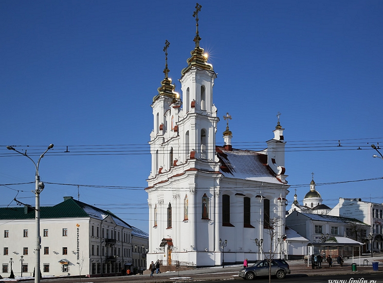 Віцебск.